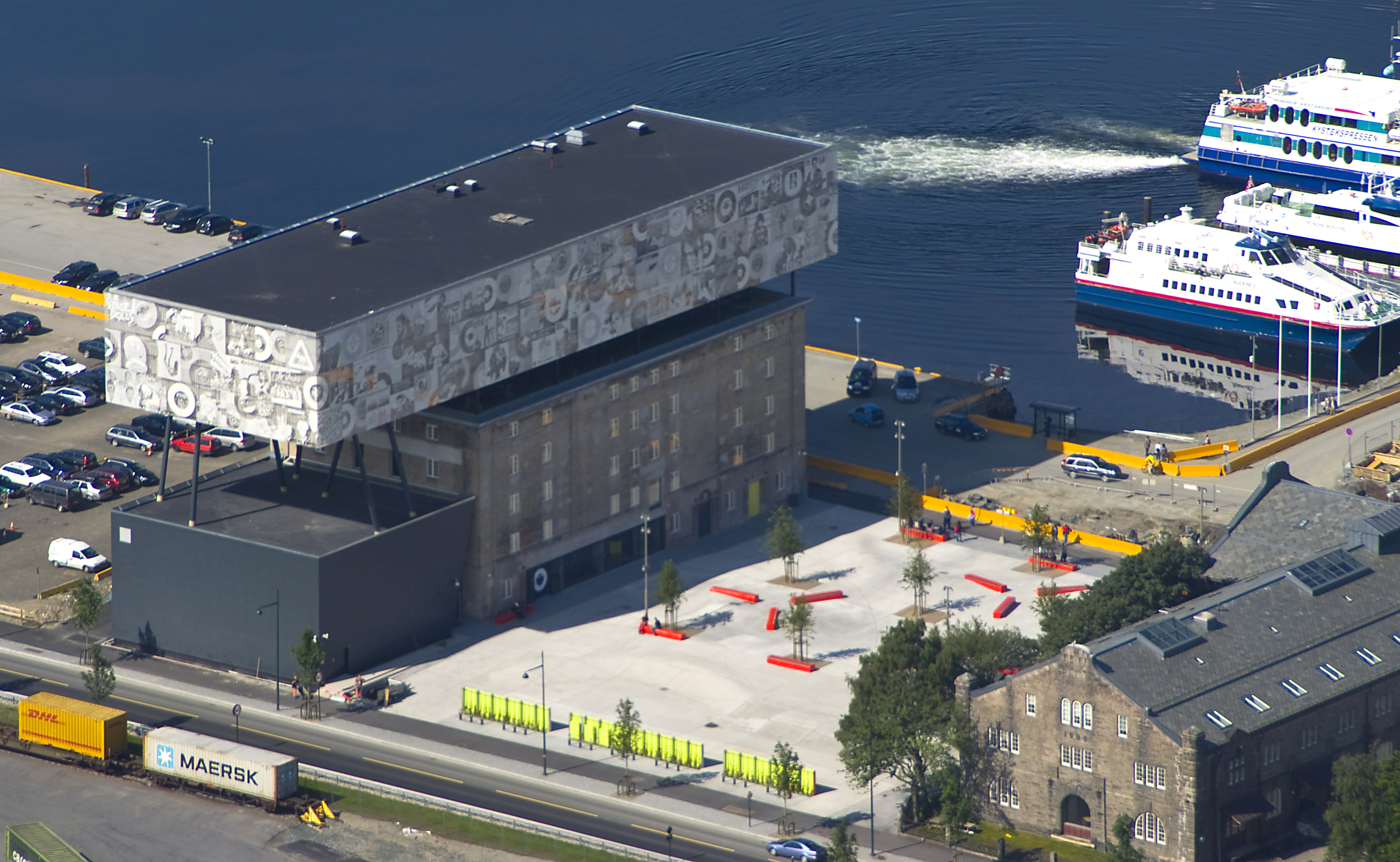 Foto: Trondheim Havn/Åge Hojem